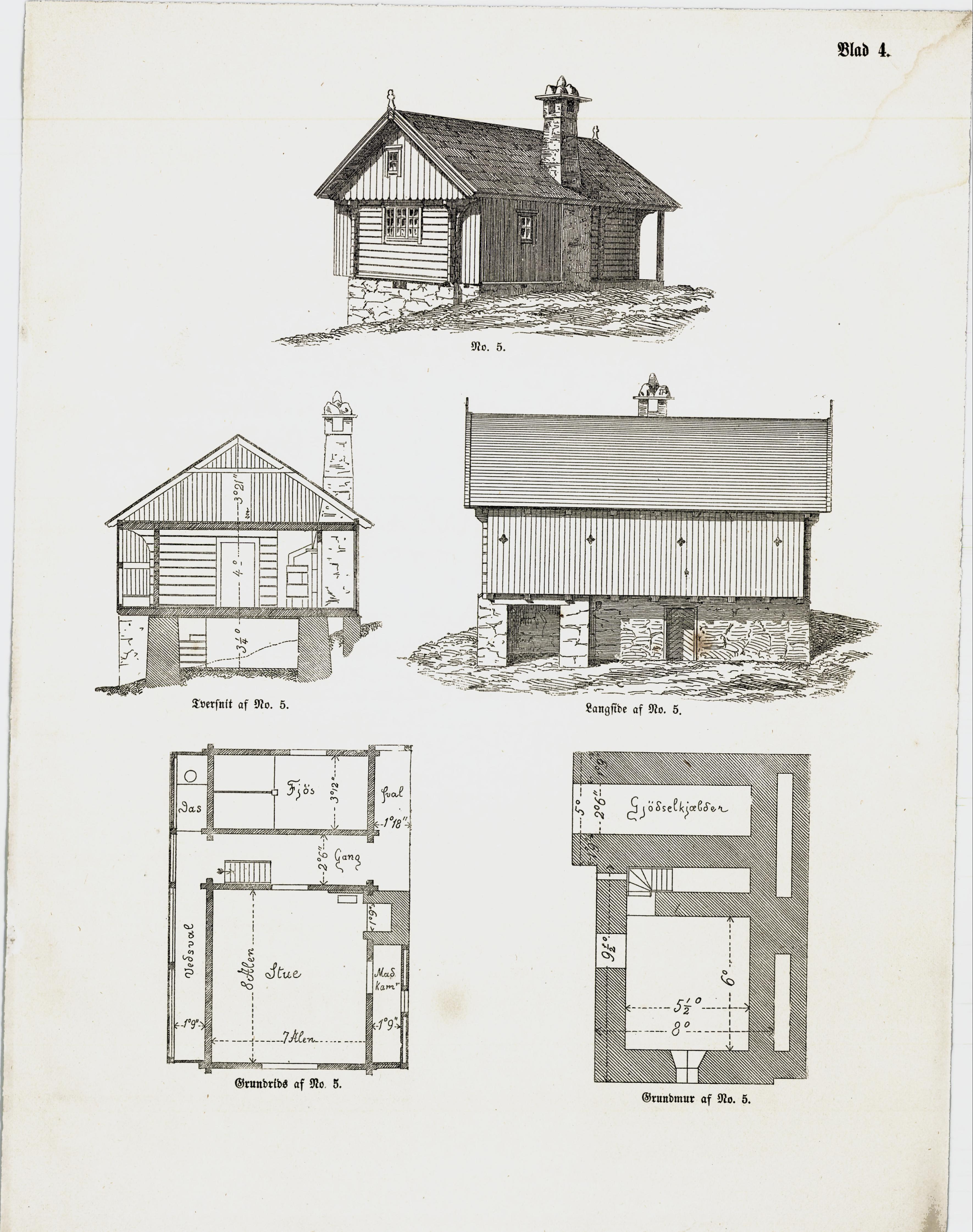 Illustrasjon hentet fra boken "Bidrag til Bygningsskikkens Udvikling paa Landet i Norge" av ukjent forfatter og utgitt av Samfundet (Christiania, 1865)